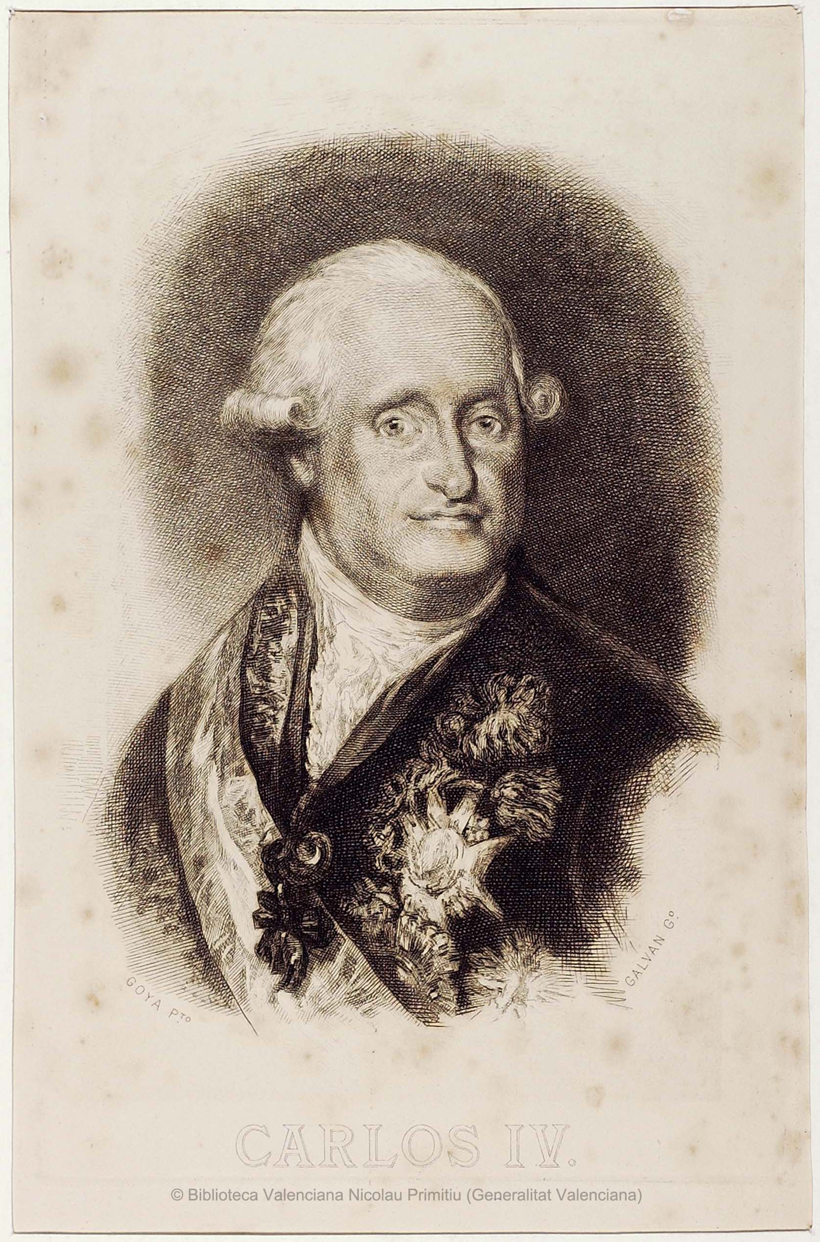 Carlos IV.